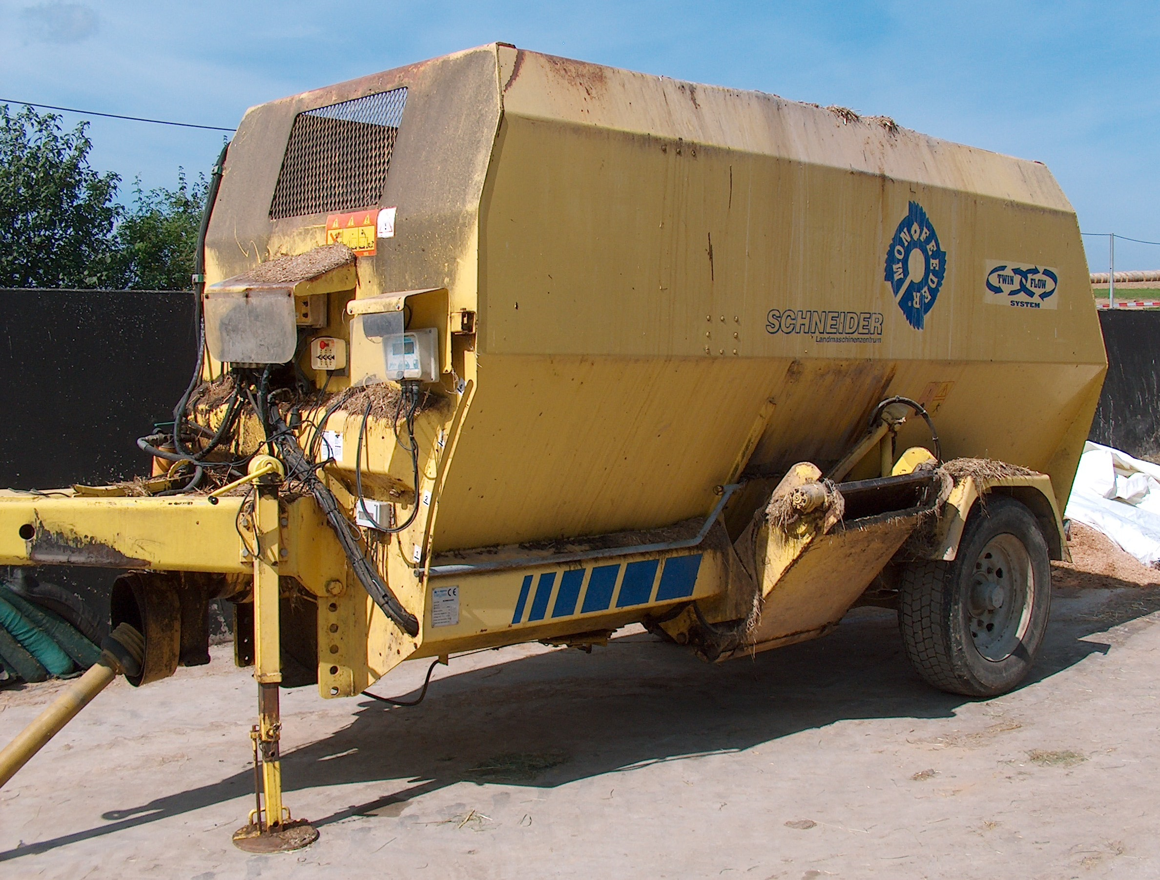 Sgariboldi Futtermischwagen (Baujahr 2000)